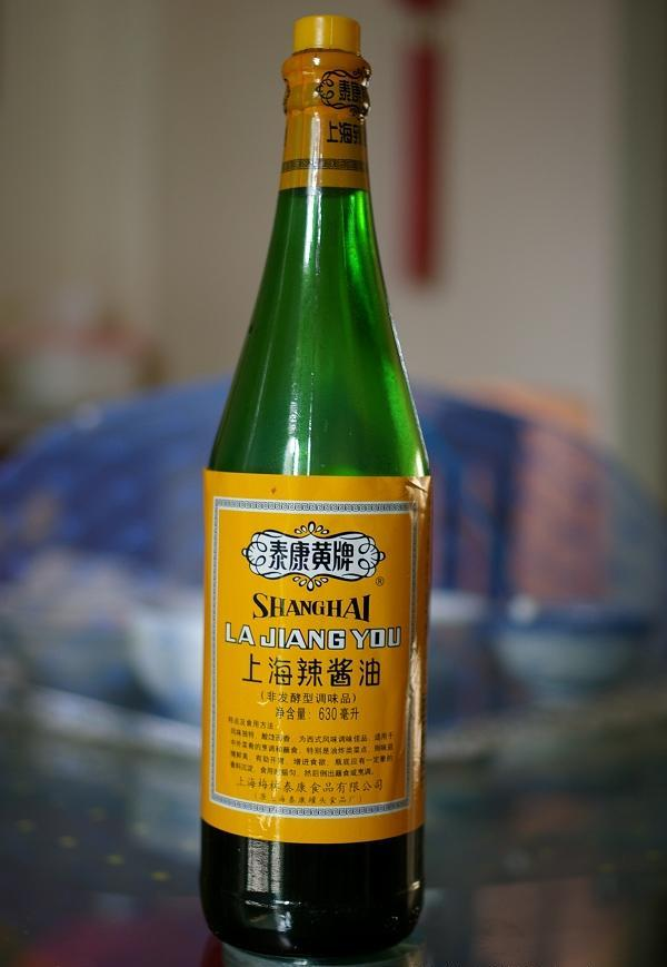 一瓶上海梅林泰康食品有限公司生产的泰康黄牌上海辣酱油